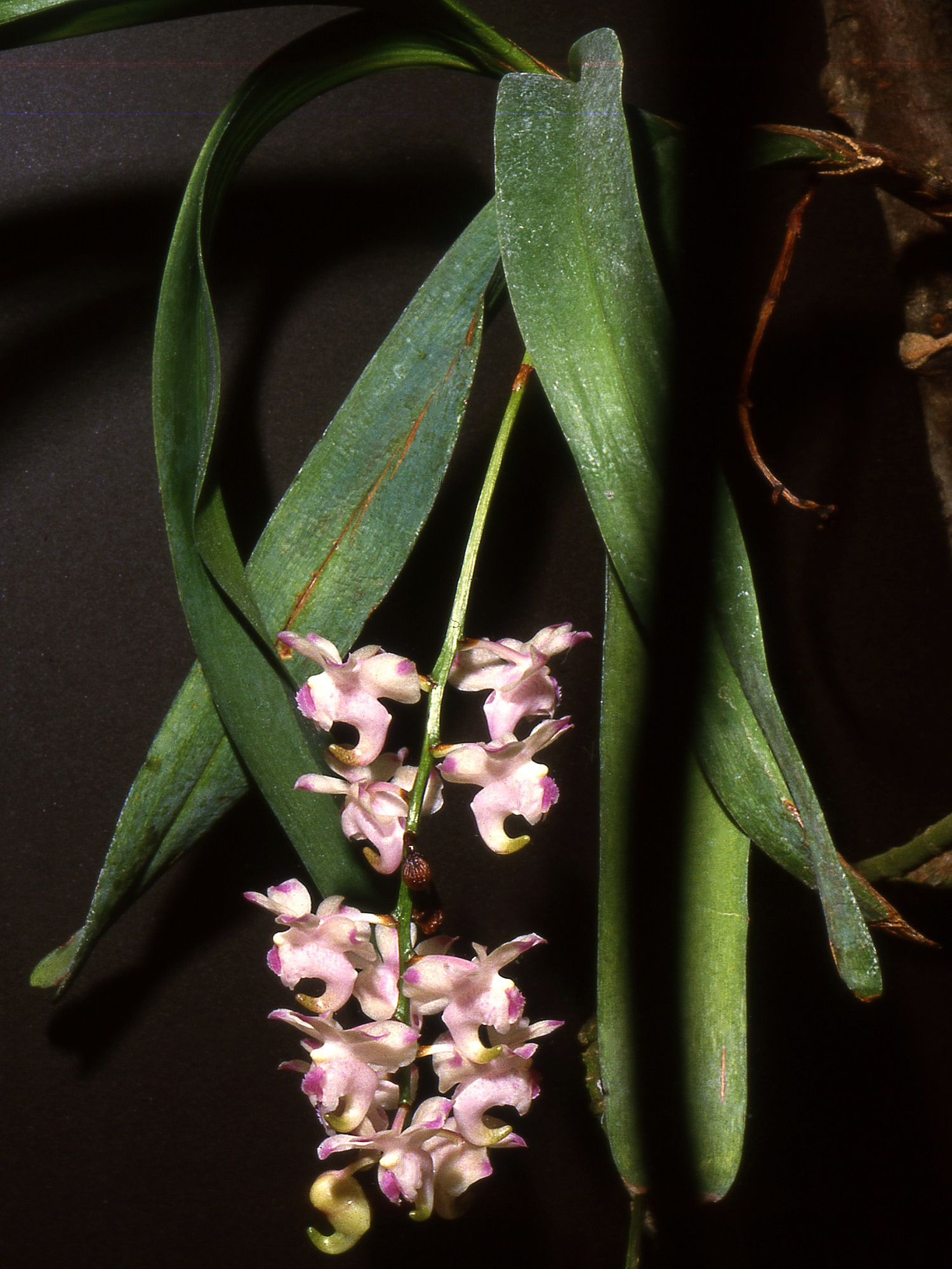 Aerides lawrenceae